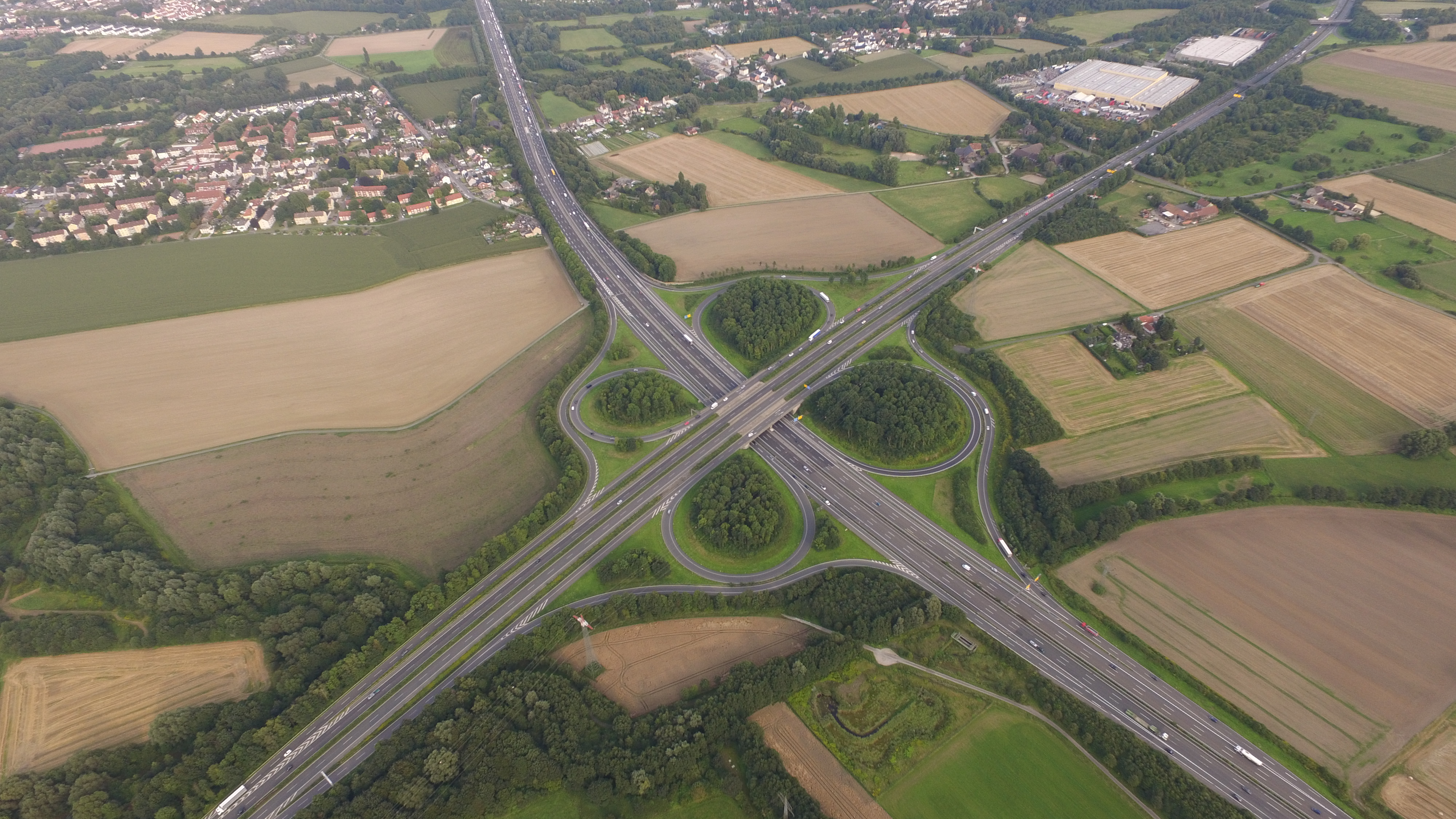 Das Autobahnkreuz Dortmund-Nordost. Die B236 führt hier über die A2.